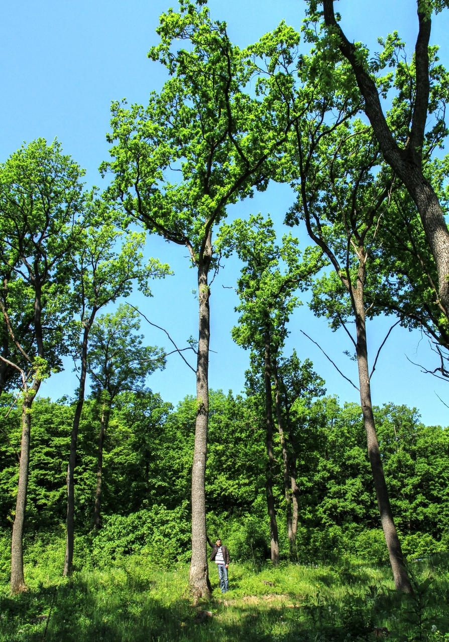 Цигэнешть, монумент природы, находится в Кэлэрашский район, Между селами Сэсень, Табэра, Цигэнешть, Бравича, Бравичское лесничество, урочище Бравича, кварталы 50, 51, 58, 61, 62, 64, 65, 67 (код MD-CL-rp-012)